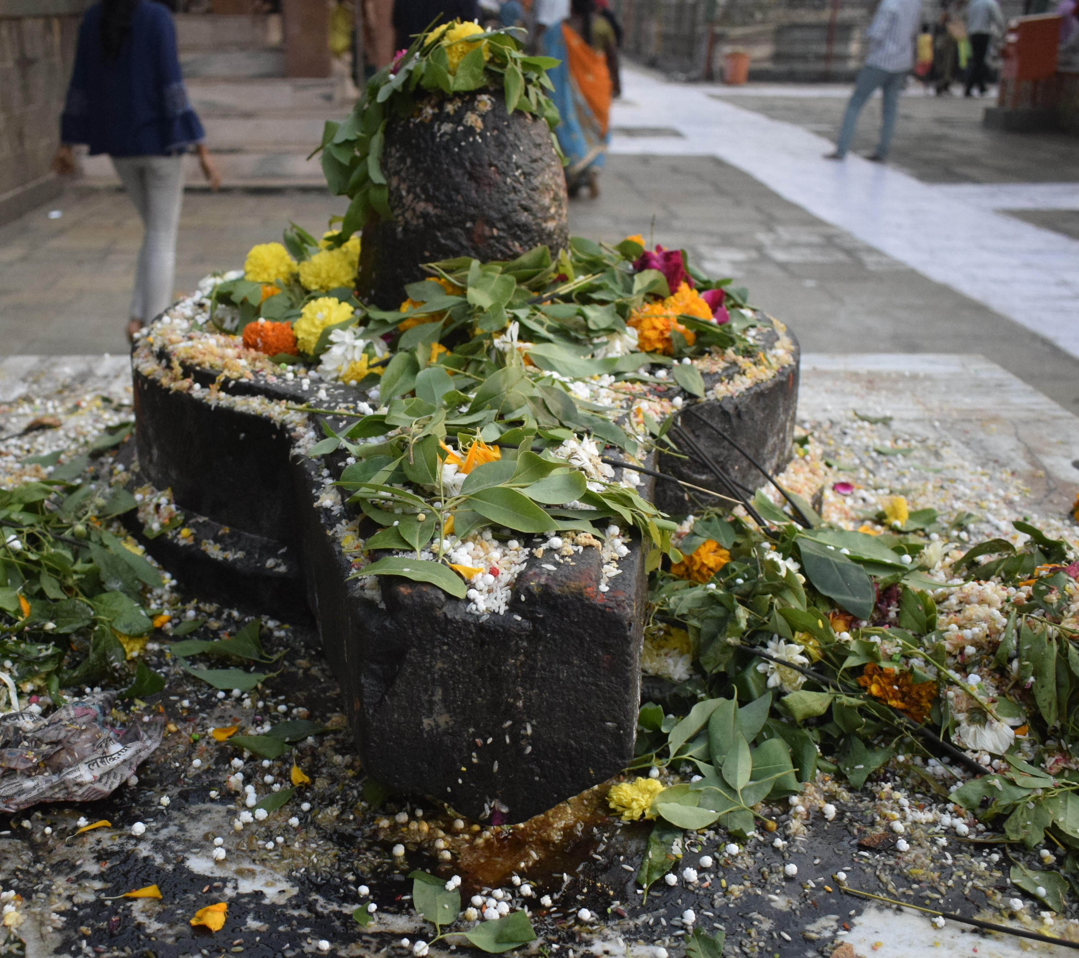 श्री योगीनाथ लिंग